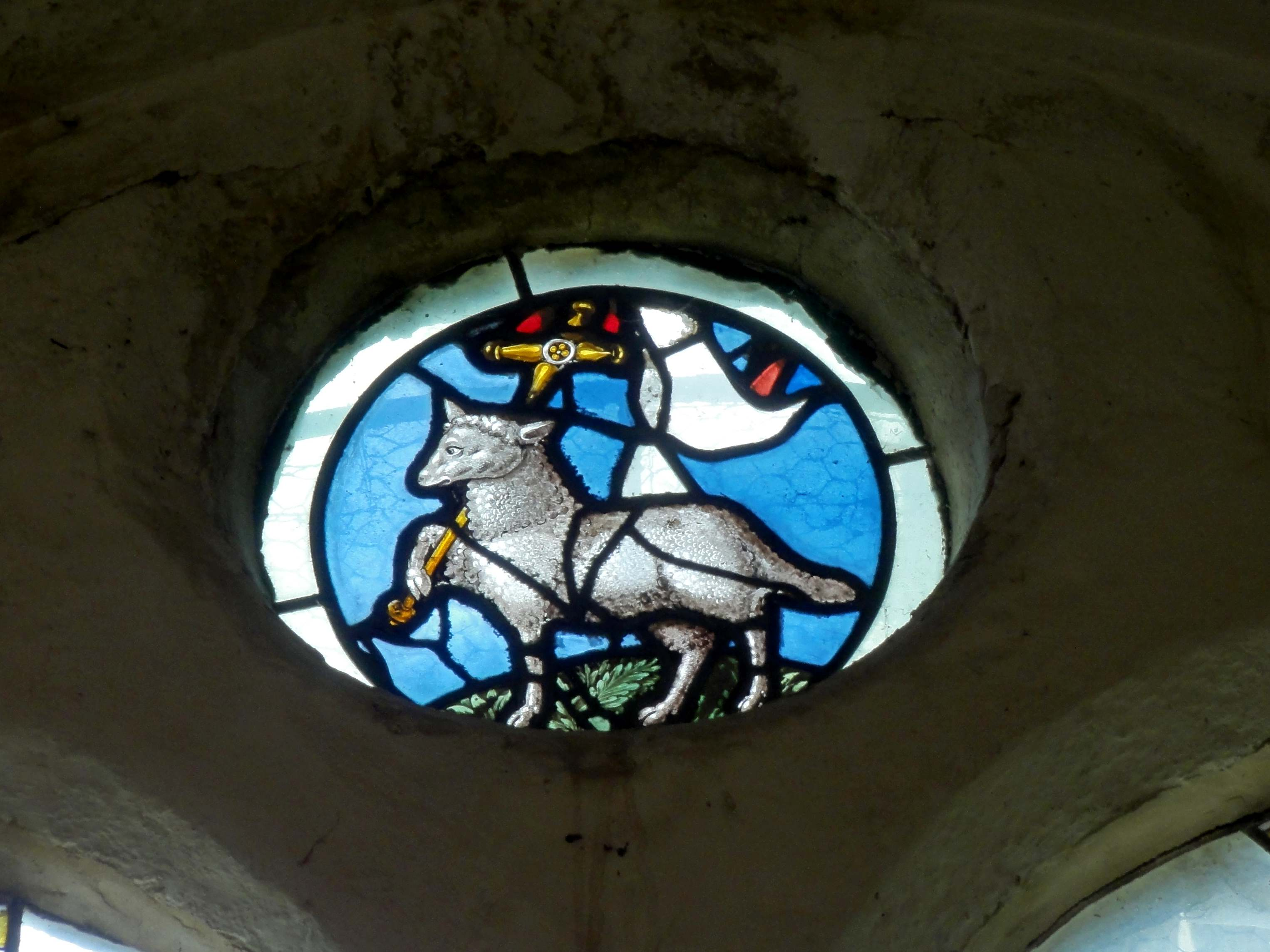 Fragments de vitraux de 1642 au bas-côté nord.